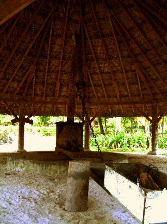 Kopra-Öl-Mühlen auf La Digue, Seychellen